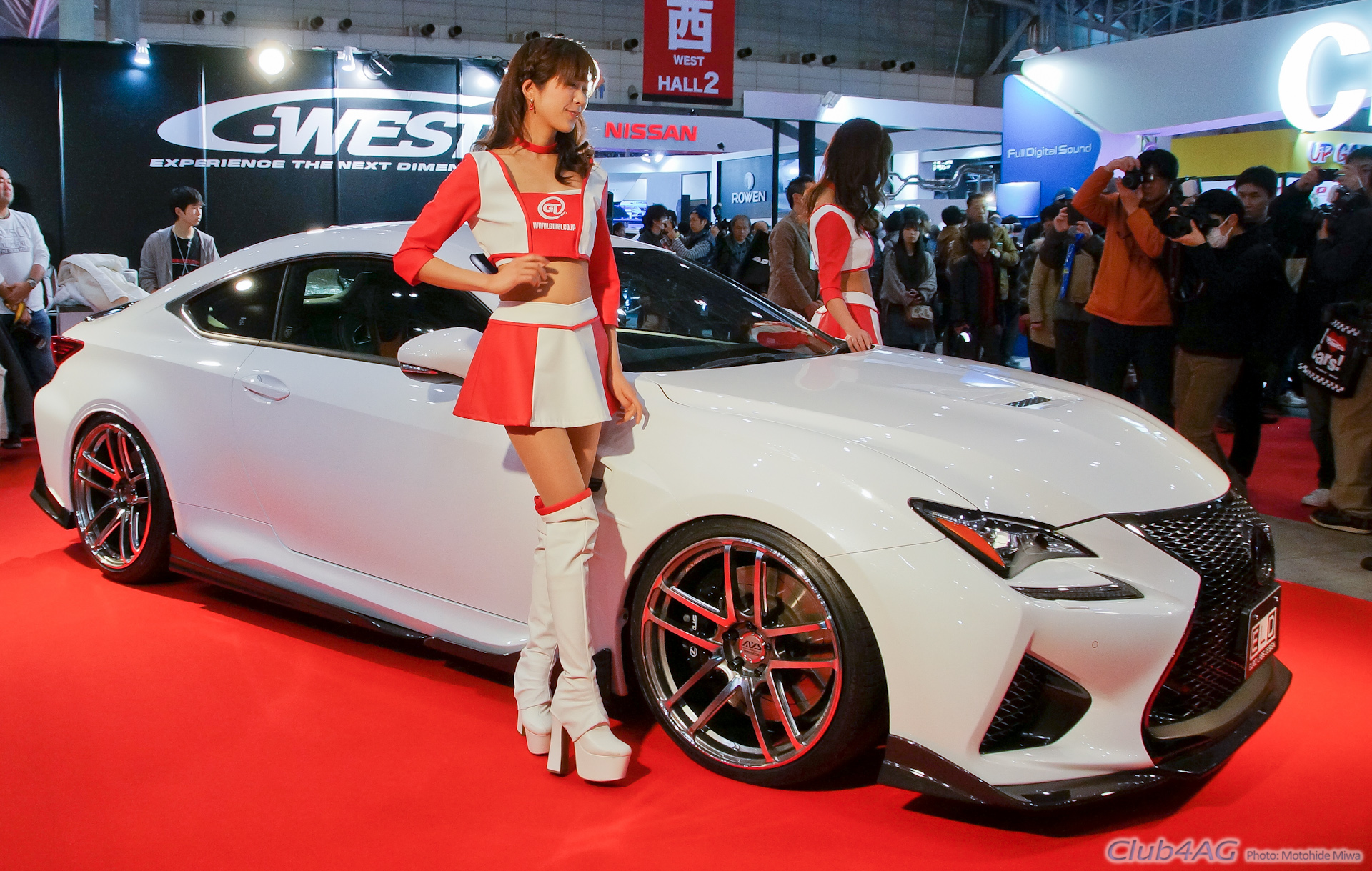 Tokyo Auto Salon 2016